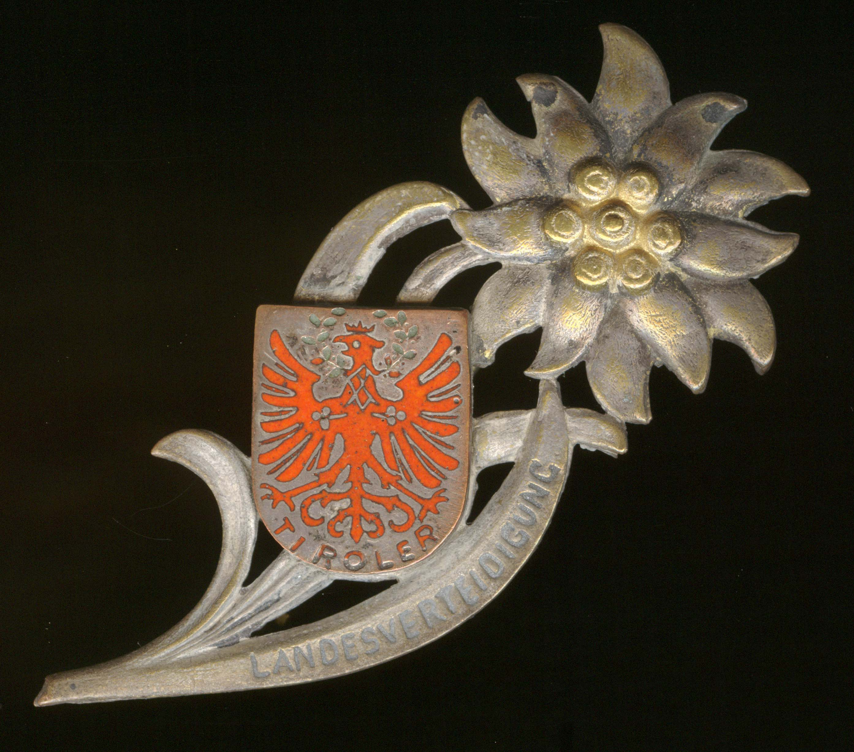 Kappenabzeichen, distintivo da berretto austro-ungarico della collezione del Museo Storico Italiano della Guerra di Rovereto